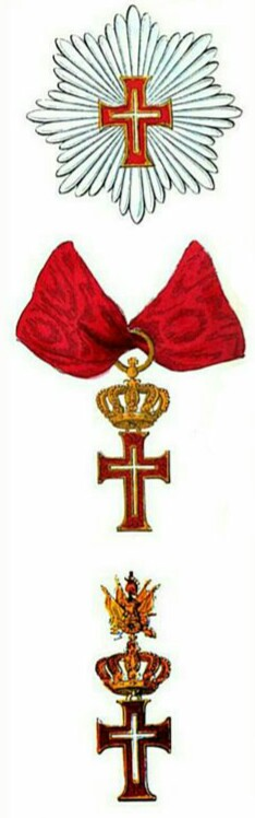 Order Najwyższy Chrystusa